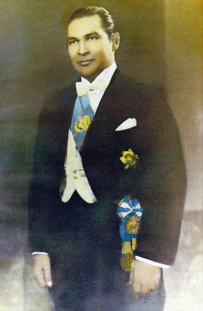 Batista's presidential photo.